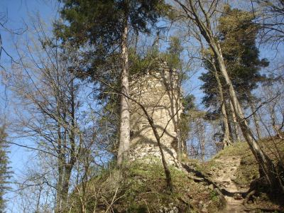 Hrad Holštejn - zaoblený střep hradby, který byl dříve považovaný jako věž